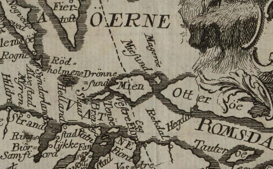 Illustrasjon hentet fra boken "Physisk og Oeconomisk Beskrivelse over Fogderiet Søndmør, beliggende i Bergens Stift i Norge" av Strøm, Hans og utgitt av Trykt hos Jonas LindgrenSorøe : Trykt hos Jonas Lindgren, 1762-1766 (Sorøe, 1762)